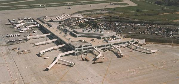 WikiMapia